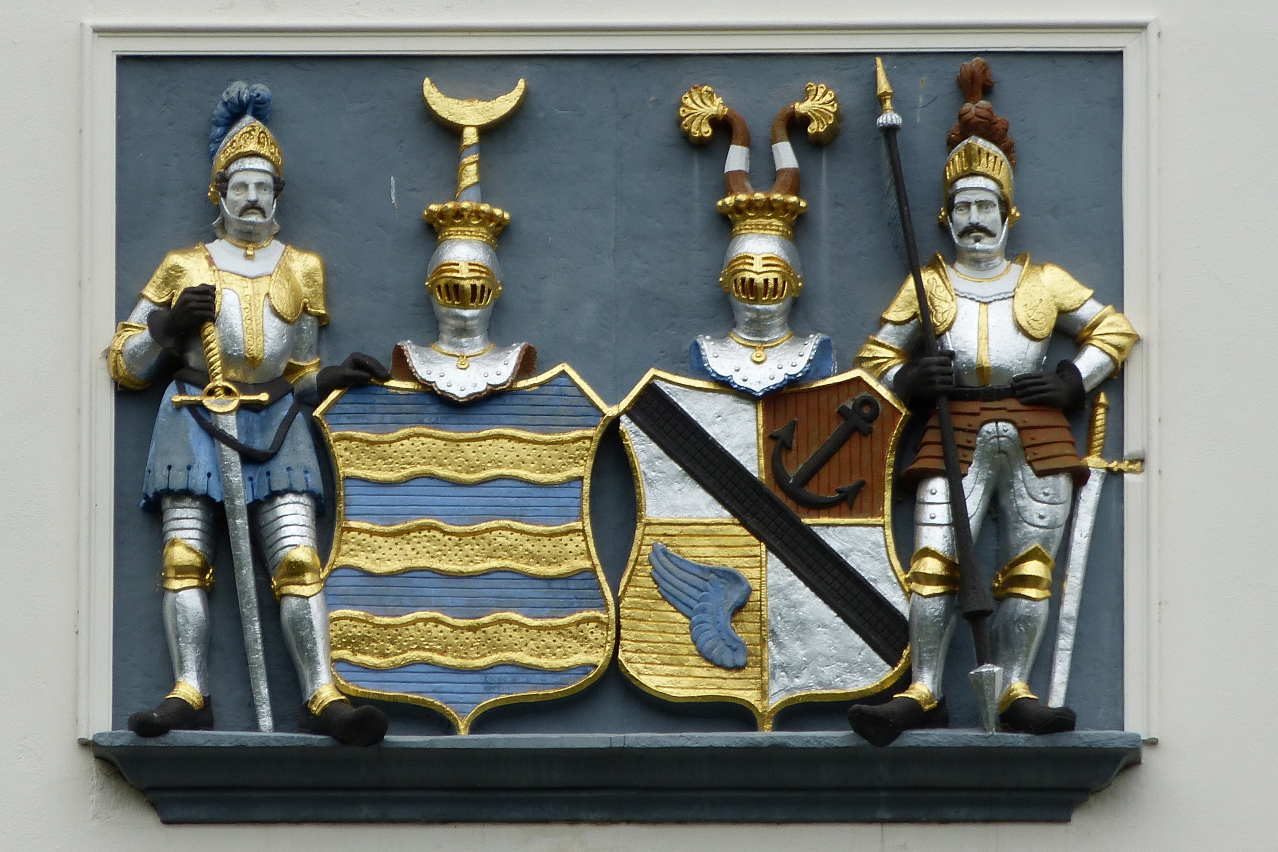 Schloss Schlemmin Tafel